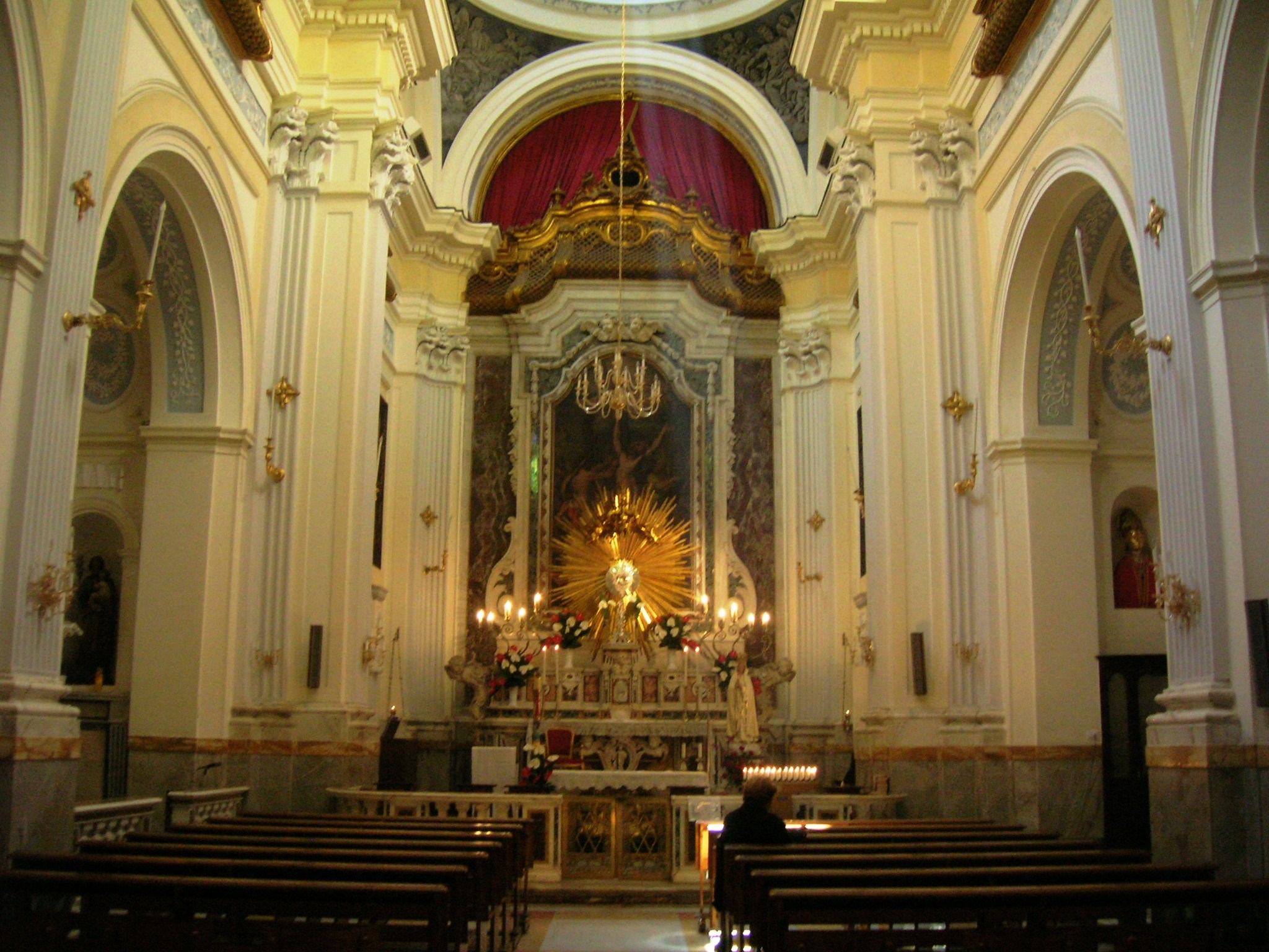 Chiesa di San Bartolomeo a Castellammare di Stabia